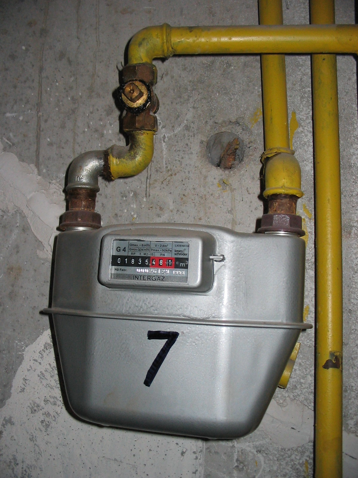 Gazomierz Intergaz. Zdjęcie wykonane dnia 15 kwietnia 2007. Gas meter Intergaz (Polish). Photo was taken 15th April 2007. Autor: Piotrm00